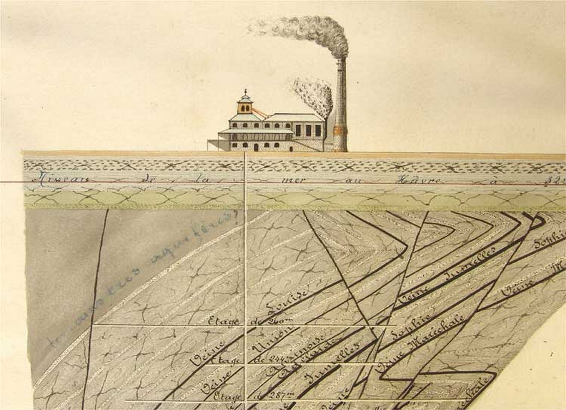 La fosse de Douchy ou n° 8 de la Compagnie des mines de Douchy était un charbonnage constitué d'un seul puits situé à Douchy-les-Mines, Nord, Nord-Pas-de-Calais, France.